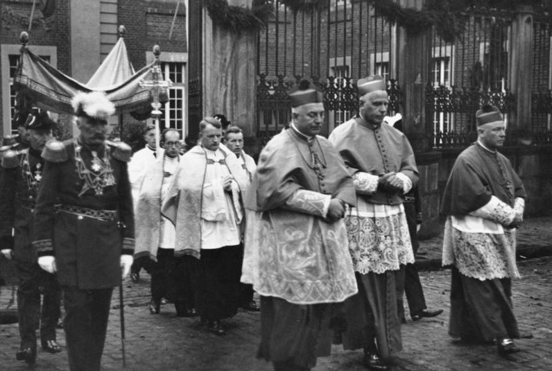 Bischofsweihe Clemens August von Galen Weihe des Bischofs von Münster, Der neue Bischof Clemens Aug[ust] Graf v. Galen wird in Begleitung Sr. Eminenz Kardinal-Erzbischof [Karl Joseph] Schulte von Köln, des Bischofs Dr. [Rudolf] Bornewasser [von] Trier und des Bischof Staatsrat Dr. [Wilhelm] Berning-Osnabrück in feierlicher Prozession aus dem Bischöflichen Palais in den Dom geleitet. 37507-33